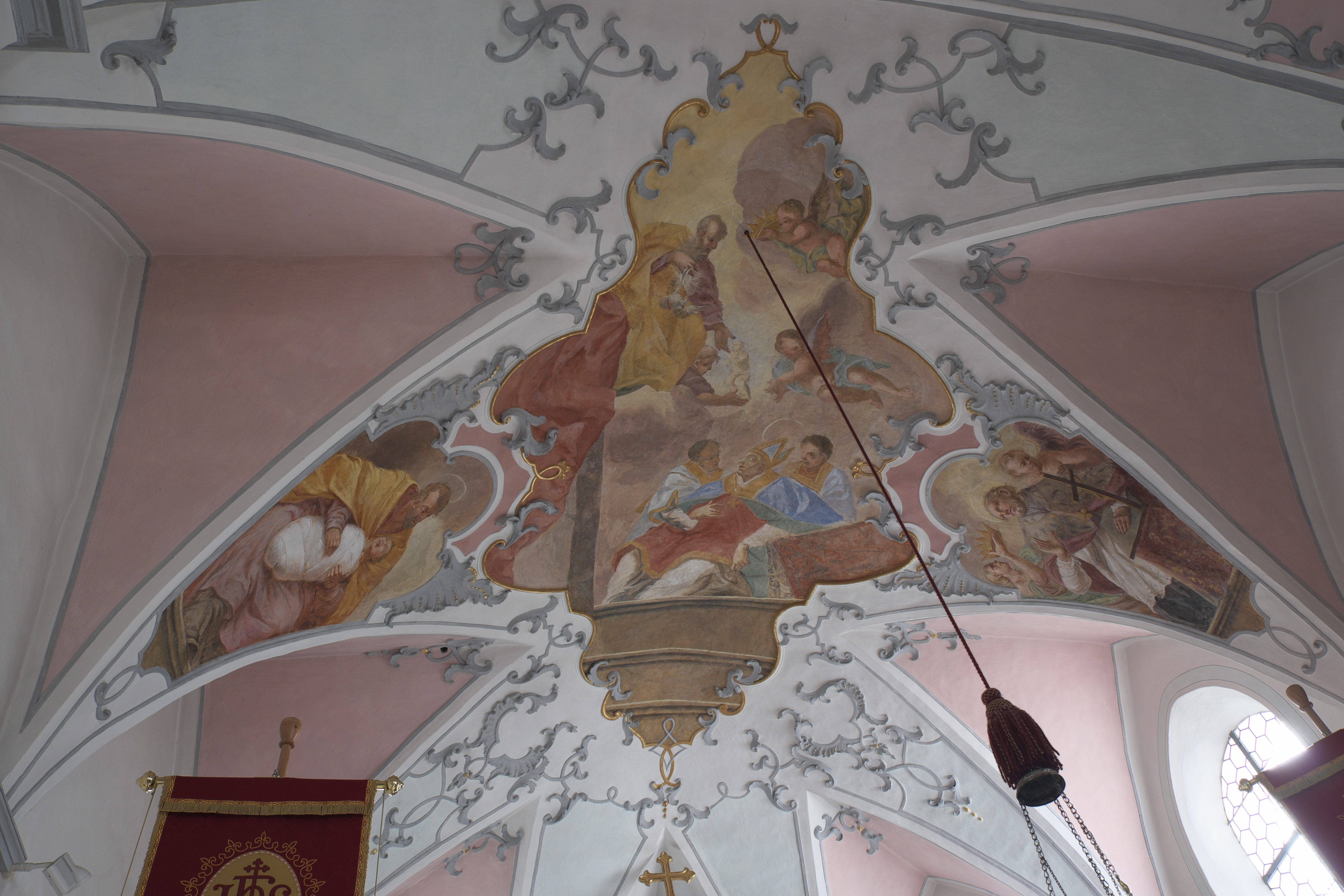 Katholische Pfarrkirche St. Rupert in Oberdießen (Unterdießen) im Landkreis Landsberg am Lech (Bayern/Deutschland), Deckenstuck im Chor, um 1740, Chorfresko von Matthias Wolcker, von 1741; Darstellung: Tod des heiligen Rupert